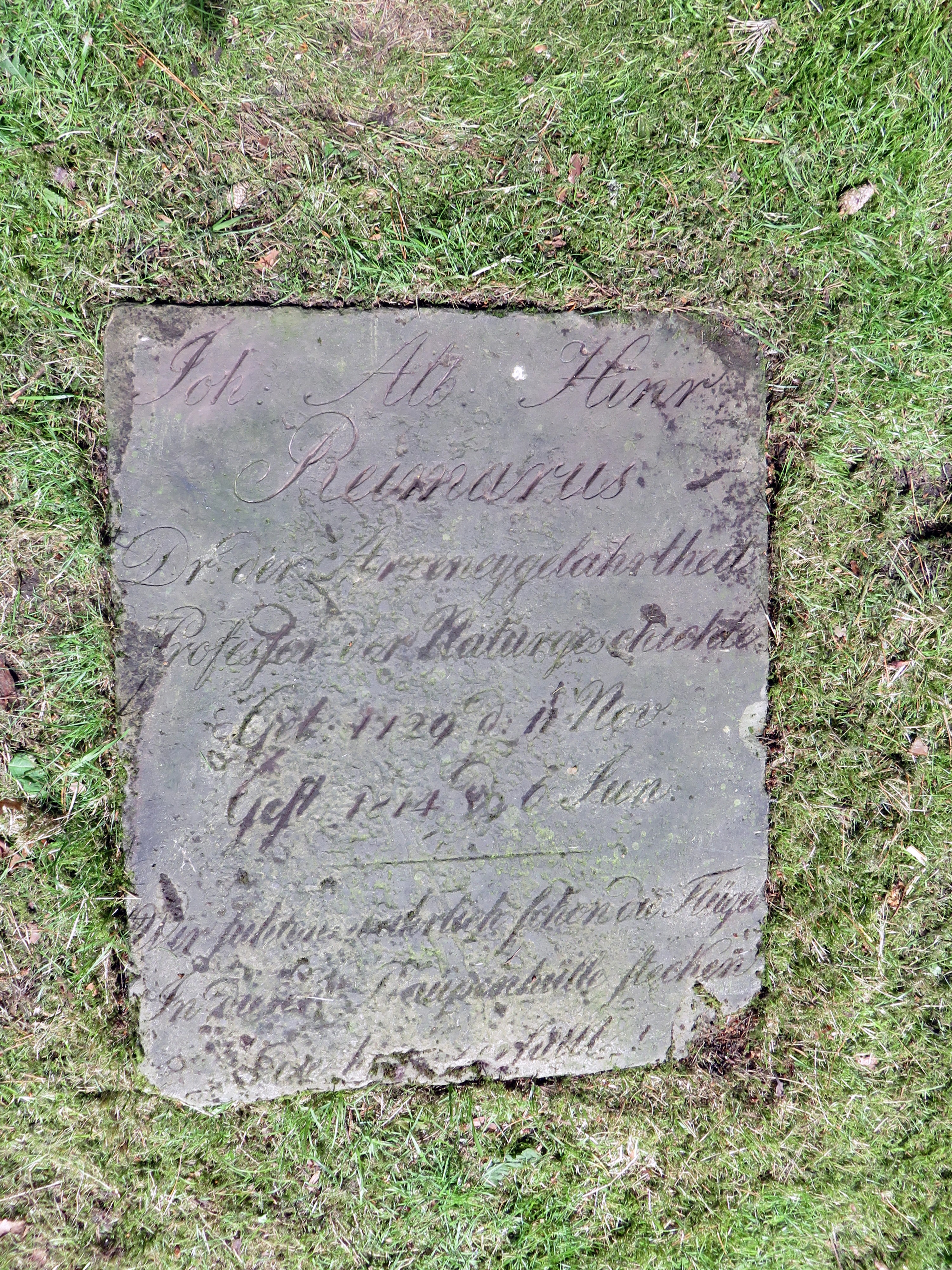 Am Boden liegendes Grabstein-Fragment der ursprünglichen Sandstein-Stele für den Hamburger Arzt und Forscher („Dr. der Arzeneygelahrtheit, Prof. der Naturgeschichte“) Johann Albert H(e)inrich Reimarus in der Sieveking-Familien-Grabanlage auf dem Hamburger Friedhof Ohlsdorf, Planquadrat S 25 / S 26. Zustand nach teilweisem Reinigungsversuch.Details bei Eberhard Kändler: Begräbnishain und Gruft. Die Grabmale der Oberschicht auf den alten Hamburger Friedhöfen. Christians Verlag, Hamburg 1997, ISBN 3-7672-1294-3 S. 130-131 sowie auf Seite 63 ein historisches Foto (rechts im Bild!) des noch intakten aufrechten Steines (neben dem seiner Ehefrau, der deutschen Aufklärerin Sophie Reimarus, von dem jedoch weder im Rasenbereich noch im Gebüsch ein Nachweis zu finden ist).Inschrift-Fragmente: Kändler S. 131 sowie bei Barbara Leisner, Heiko K. L. Schulze, Ellen Thormann: Der Hamburger Hauptfriedhof Ohlsdorf. Geschichte und Grabmäler., Verlag Hans Christians, Hamburg 1990, S. 23, Kat. 63